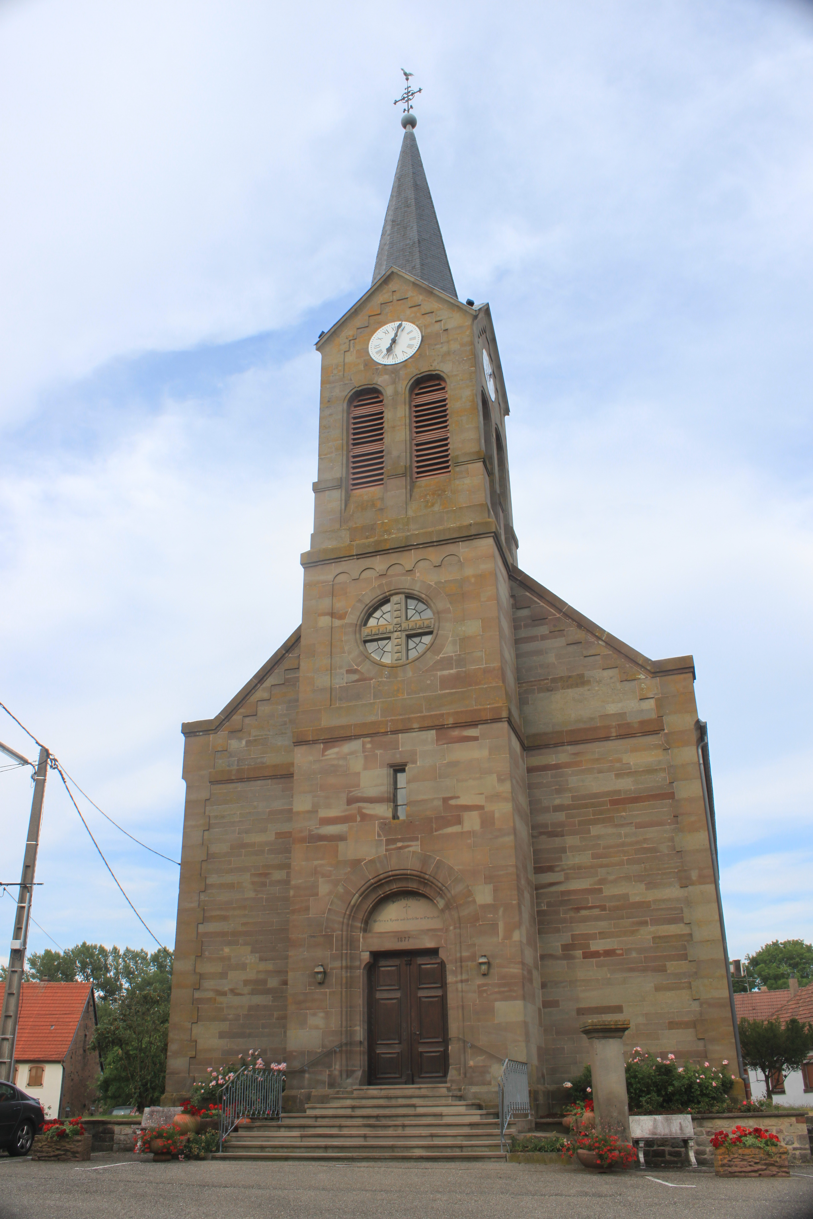 Eglise protestante de Lohr (67290) inaugurée le 20 octobre 1878.